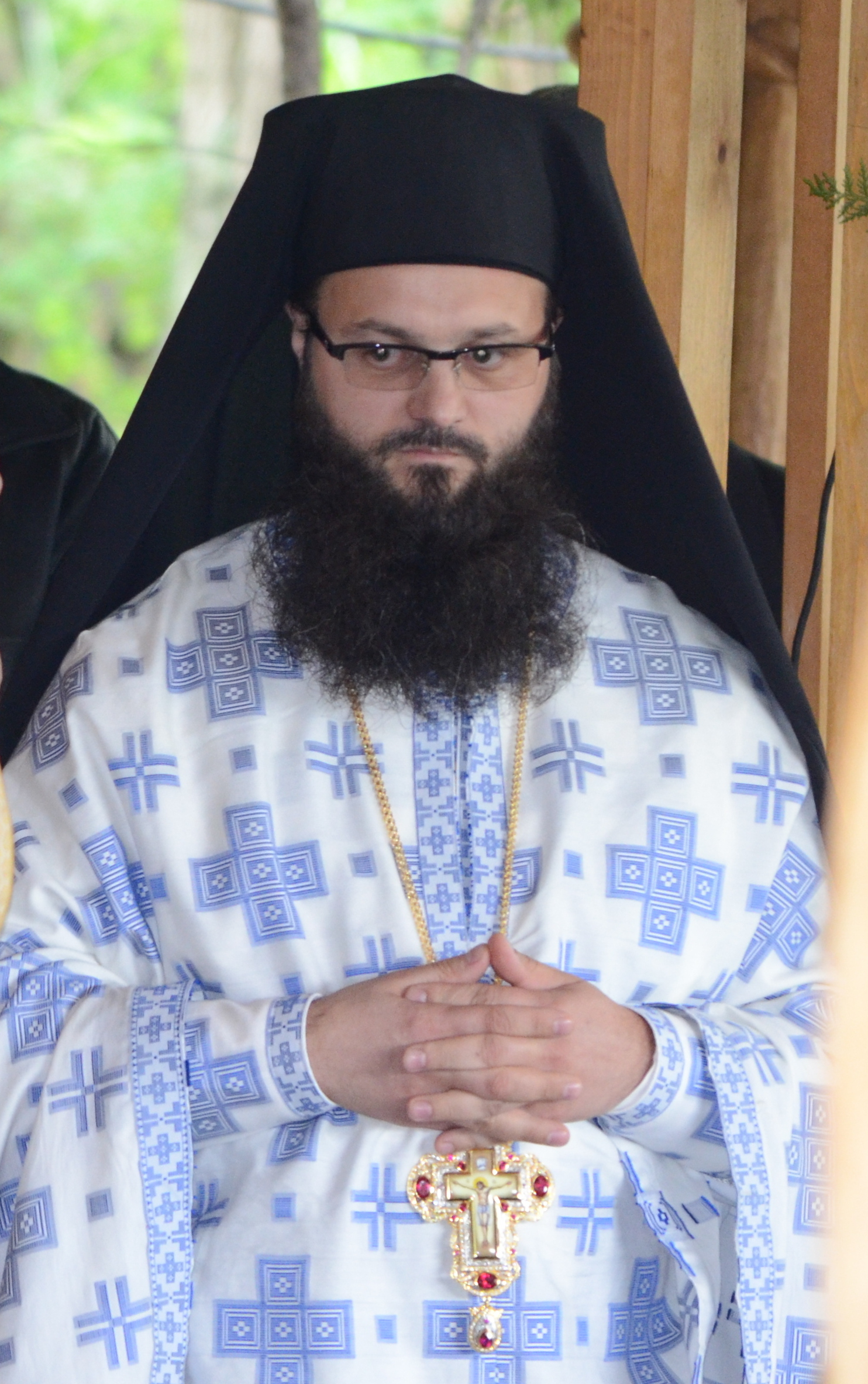 Preacuviosul Părinte Protosinghel Macarie Șotârcă, starețul Mănăstirii "Sf. Ioan Rusul" din Comuna Slobozia, jud. Giurgiu